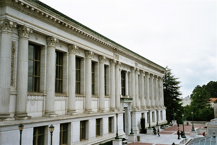 Bibliothèque de l'université de Berkeley, Californie Auteur : Utilisateur: Urban J'ai pris cette photo au cours d'un voyage en Californie en avril 2004 GFDL utilisateur:Urban